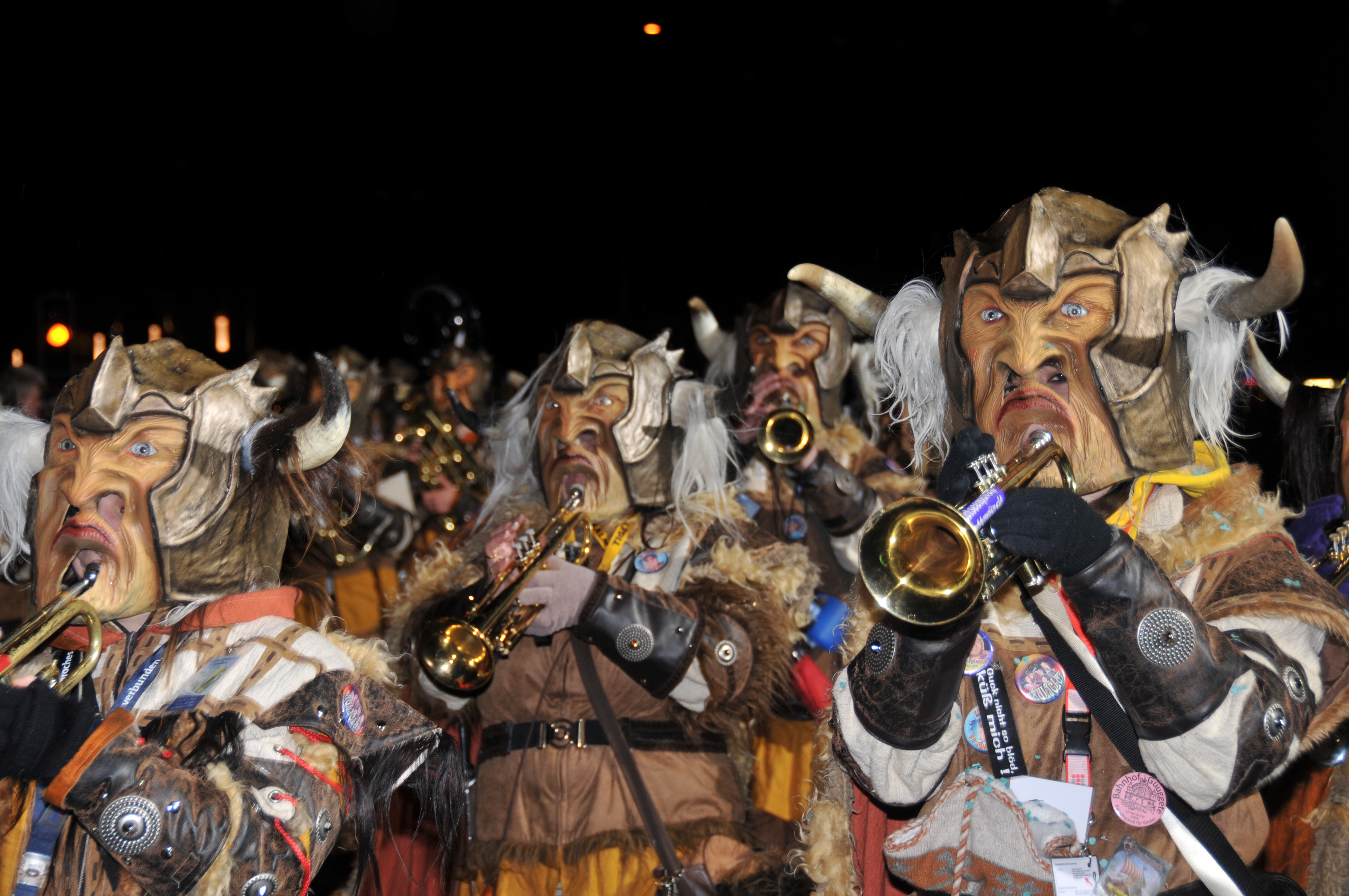 Monstercorso 2009, Luzerner Fasnacht